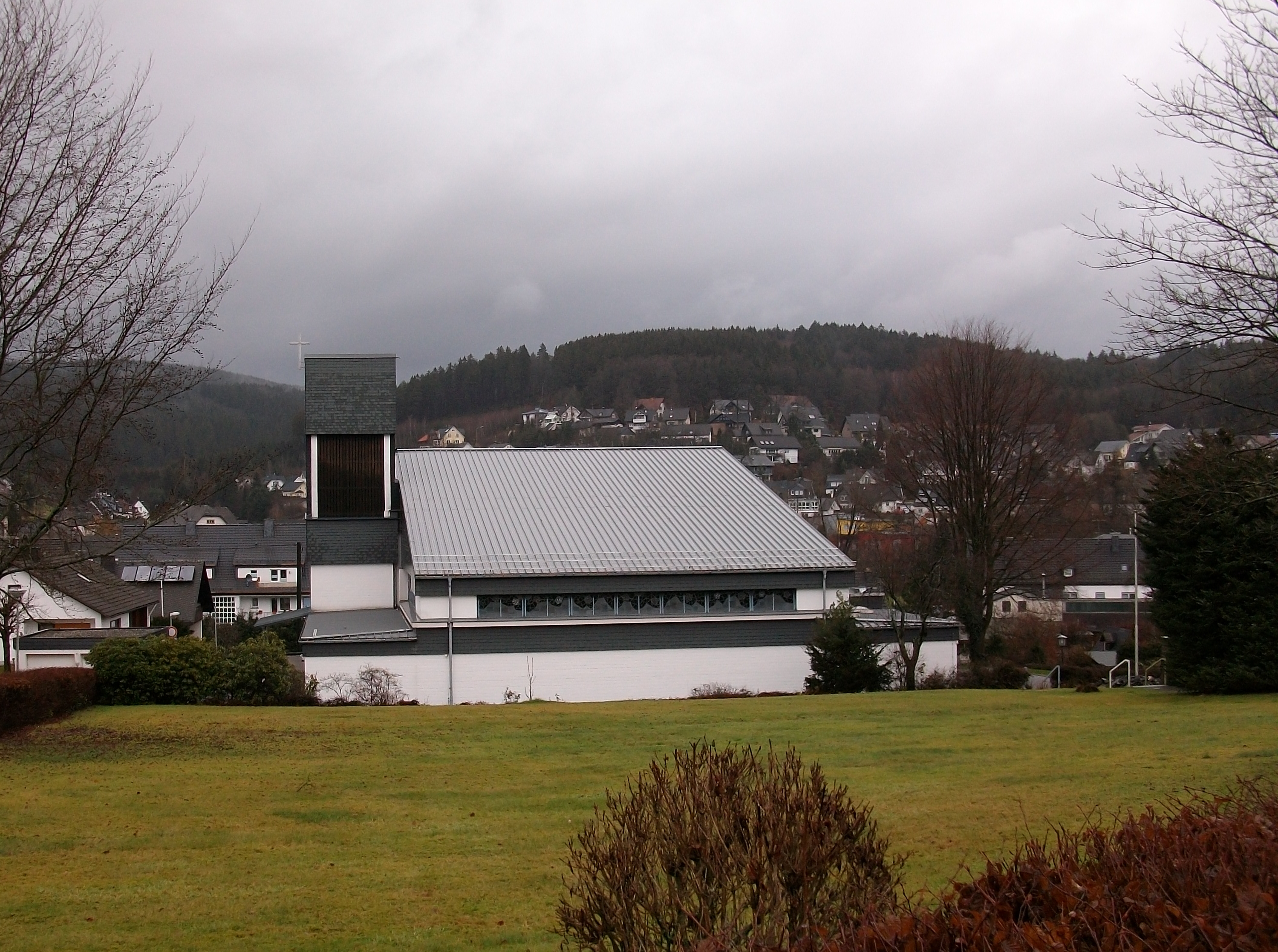 St. Bartholomäusin Kirchhundem-Würdinghausen, Germany